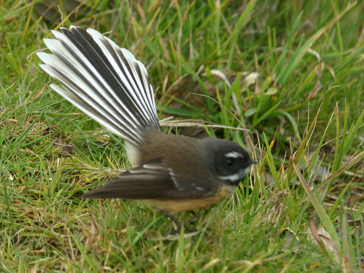 Fantail